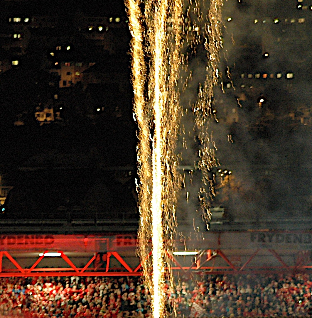 Fyrverkeri da Brann fikk medaljer på Stadion 2007